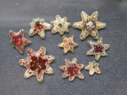 Un groupe d'étoiles de mer Aquilonastra conandae trouvées à la Réunion.